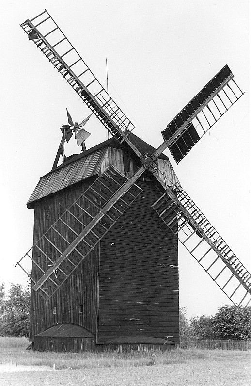 Original image description from the Deutsche Fotothek Michendorf-Langerwisch. Paltrockmühle (1839 als Bockmühle erbaut, 1930 umgesetzt und Umbau)